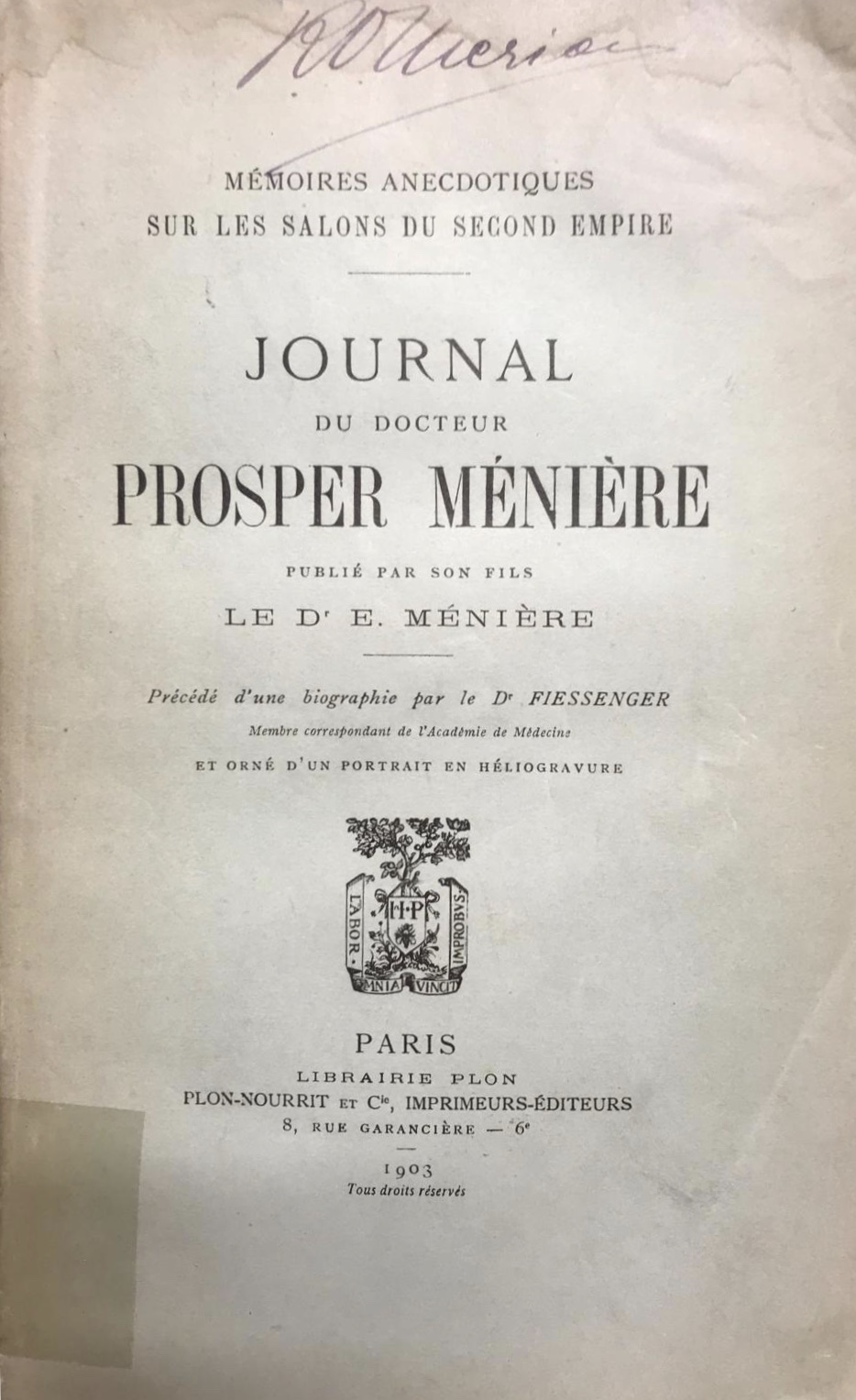 Frontespizio del libro, Journal du Dr Prosper Meniérè. Mémoires anecdotiques. scritto da E. Ménière